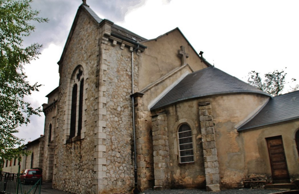 église St Nicolas